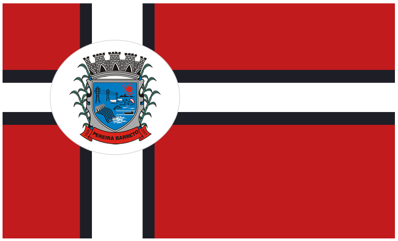 Bandeira da cidade de Pereira Barreto - São Paulo - Brasil.